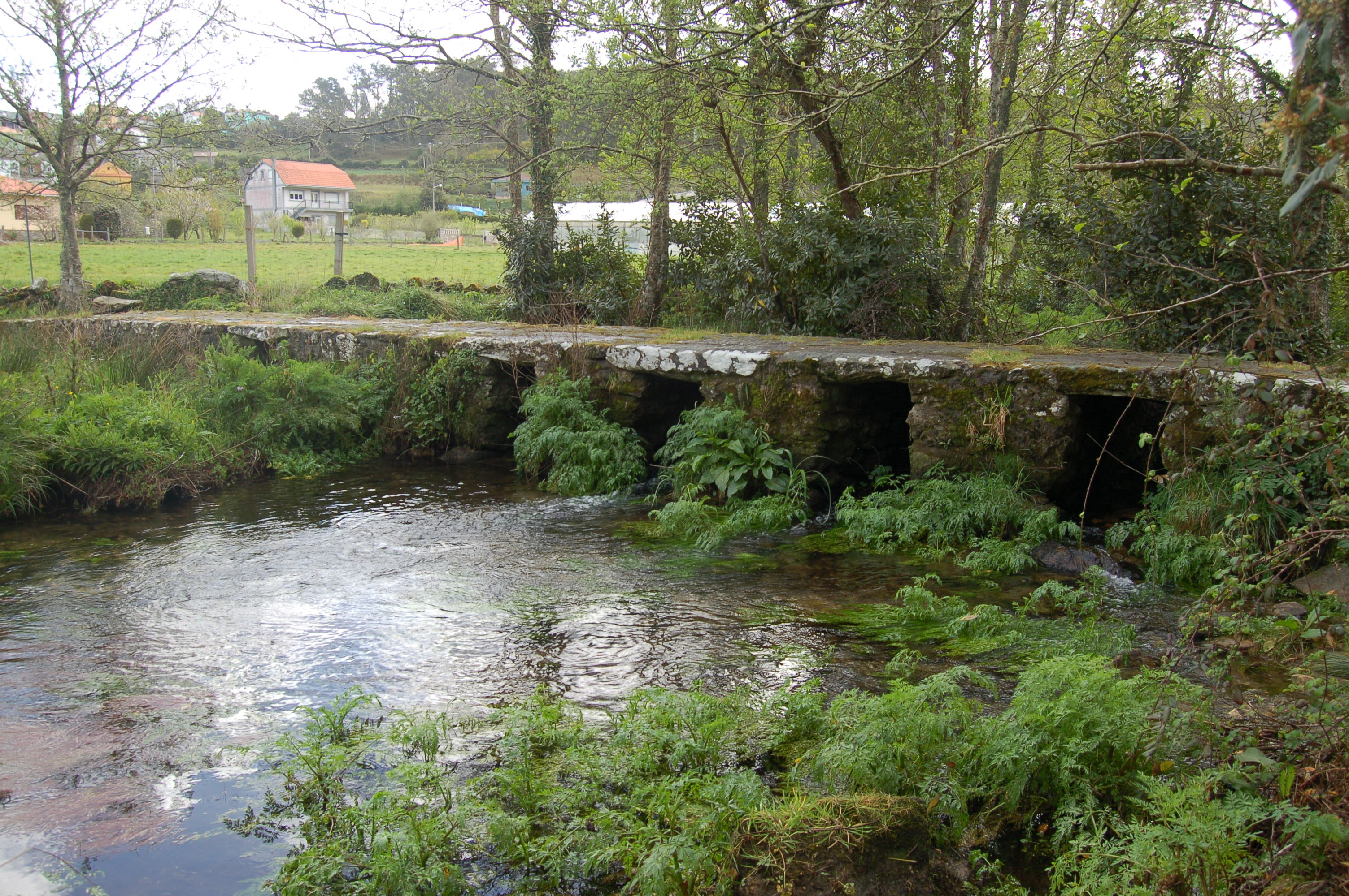 Pontella Vella sobre o río Castro en Lires (Cee). Licensing Categoría:Imaxes de Lires Categoría:Imaxes de pontes da provincia da Coruña